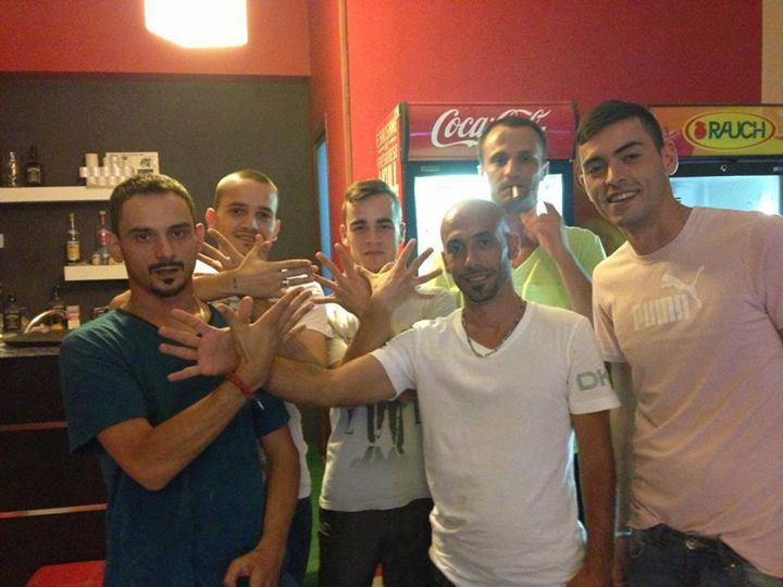 Te Tanet